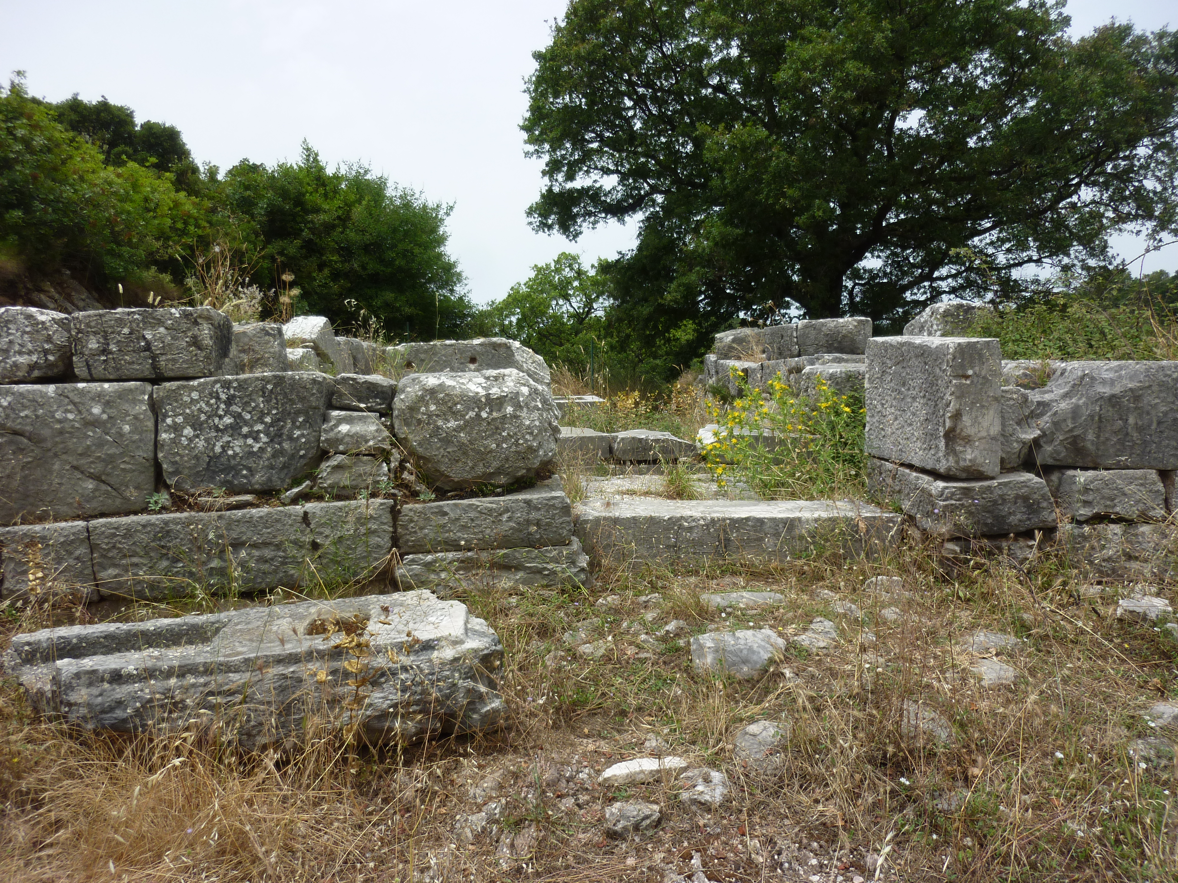 Temple d'Athéna à Phigalie, Grèce